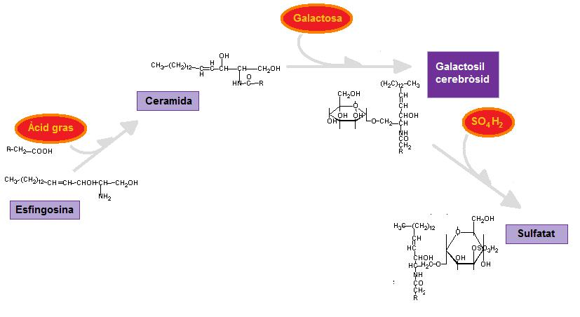 Esquema sobre el galactosil cerebròsid